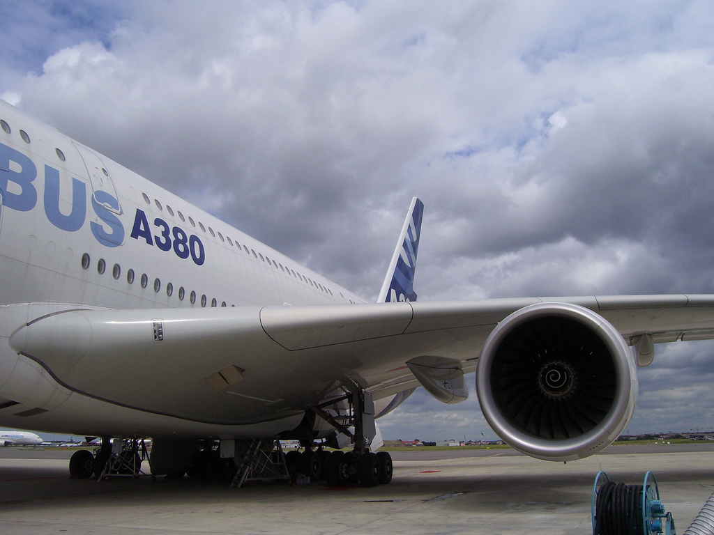 France, haute-Garonne, Toulouse, A380